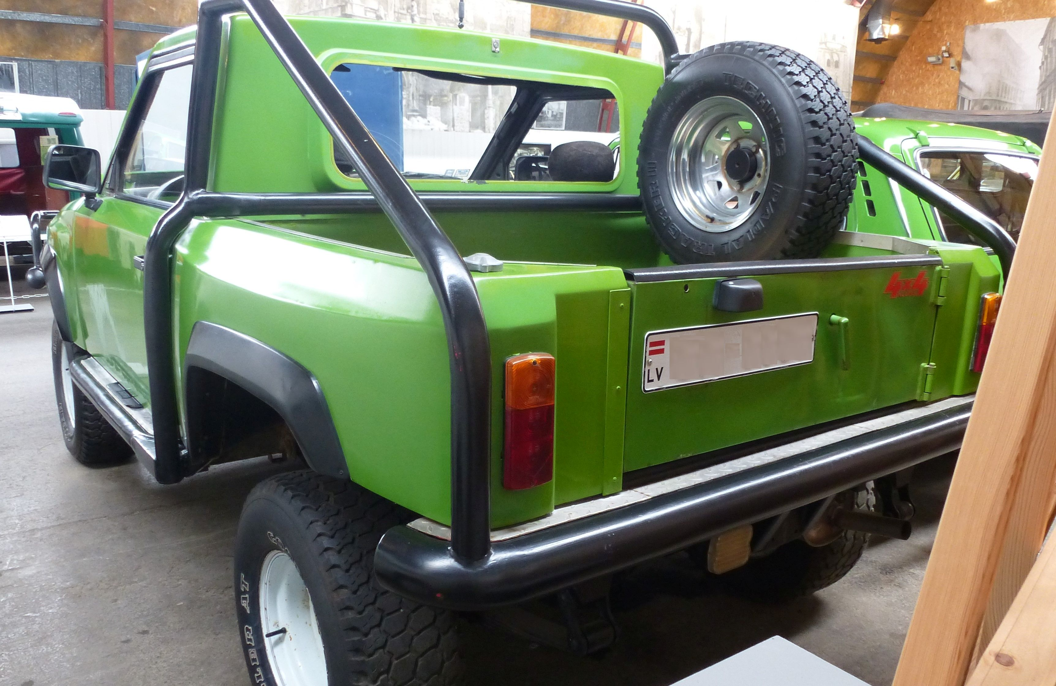 Baltijas Dzips 1995